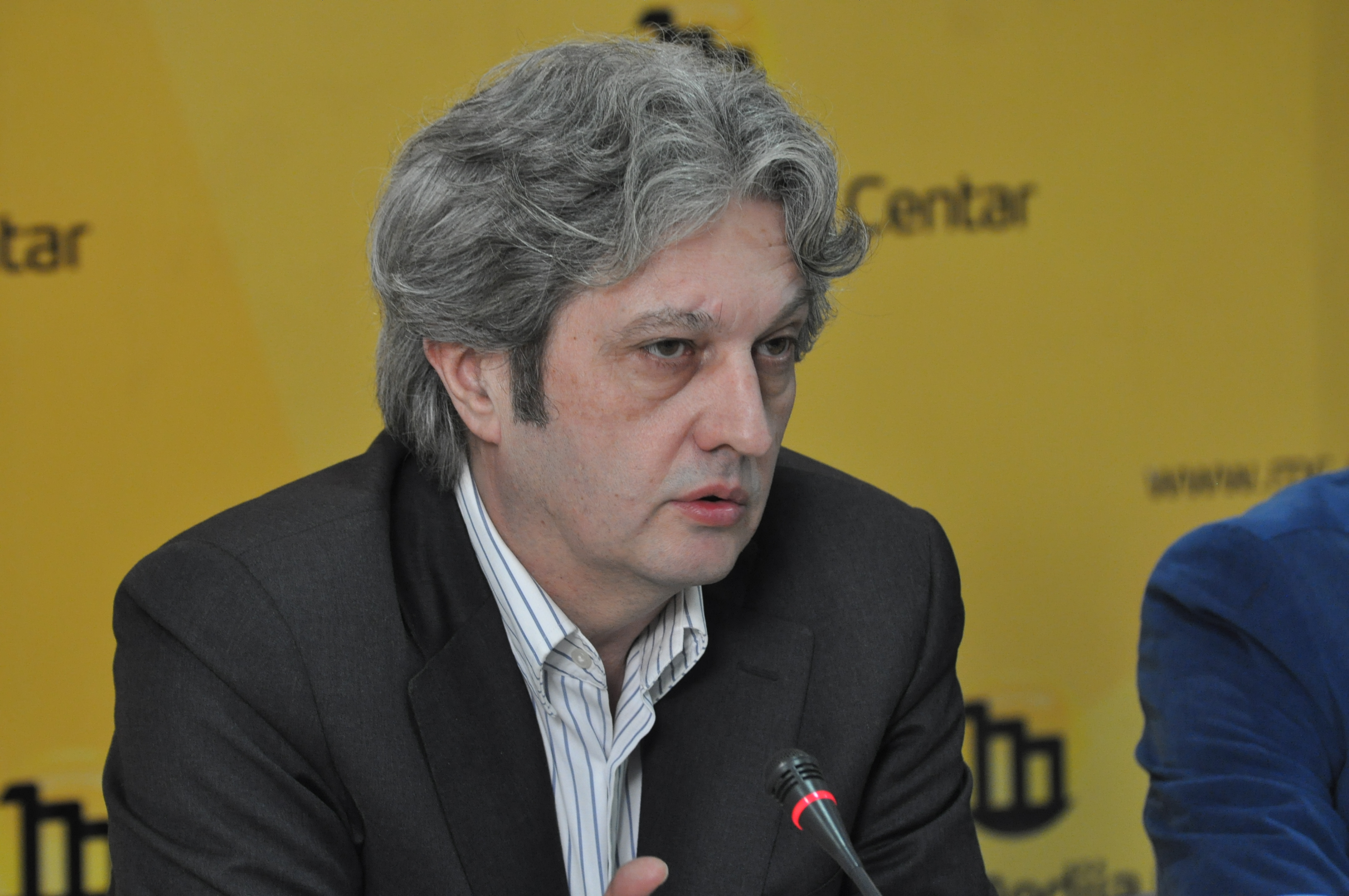 Миломир Марић српски новинар